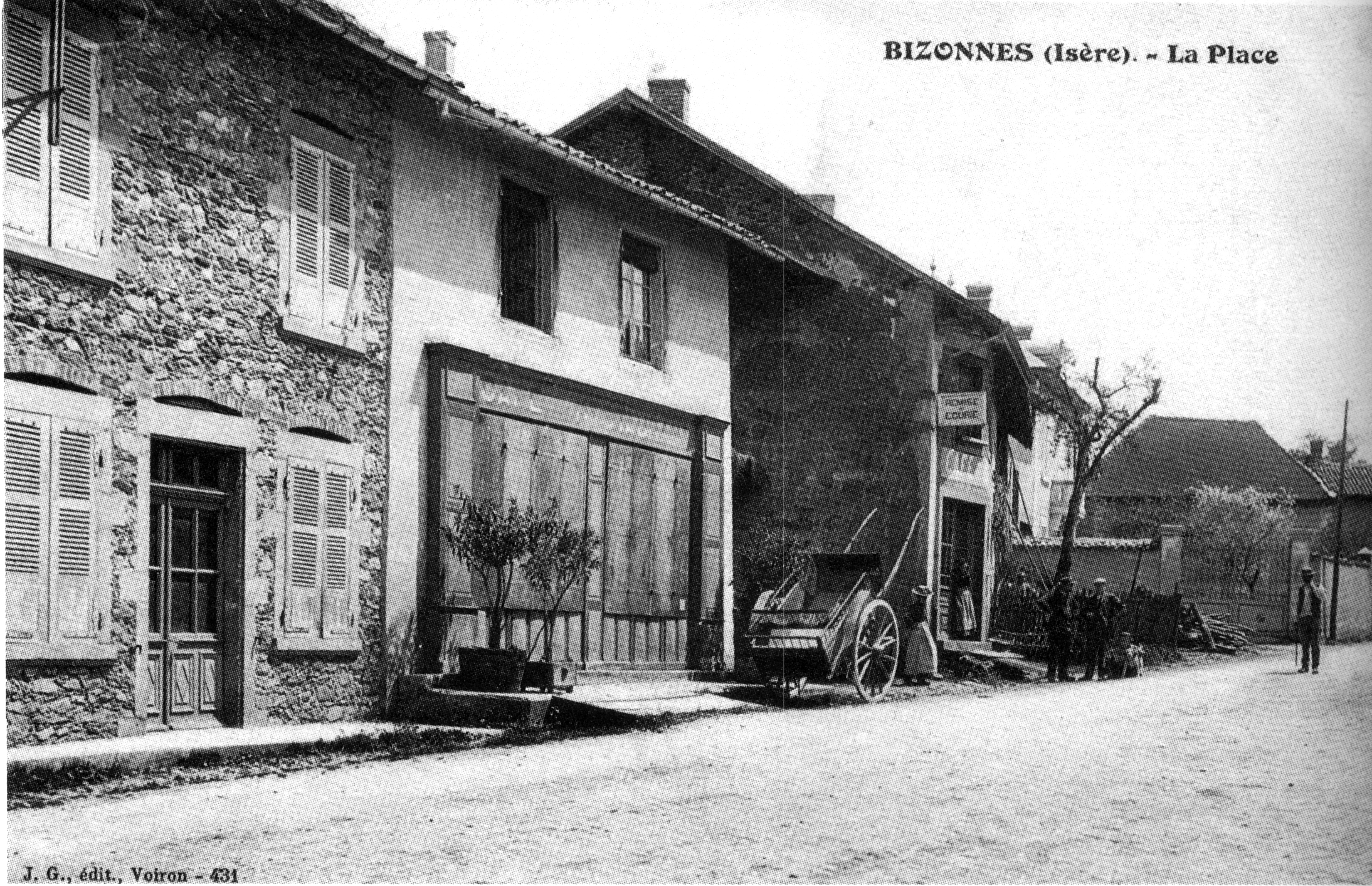 Bizonnes, la place en 1910. p 26 de L'Isère les 533 communes. Carte postale imprimée par J.G editeur à Voiron.